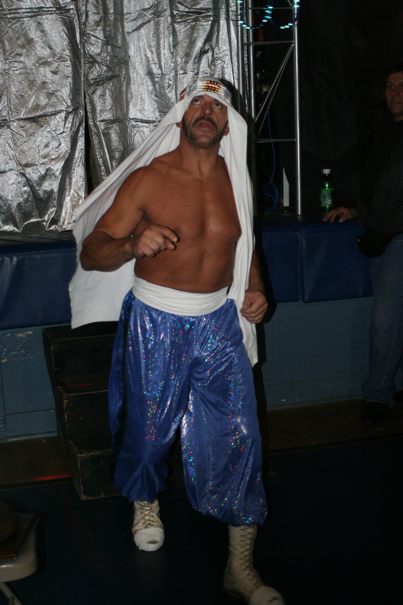 sabu en la wwa